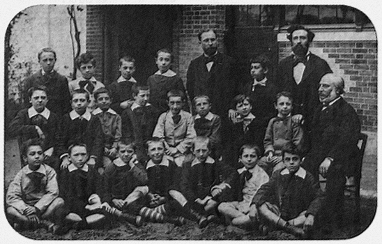 Photo d'une classe de l'École alsacienne (Paris, 6e arrond.), vers 1878. Au premier rang, deuxième à gauche : André Gide. Assis à l'extrème droite, le directeur Frédéric Rieder. Photographe inconnu (supposé : Jules David).